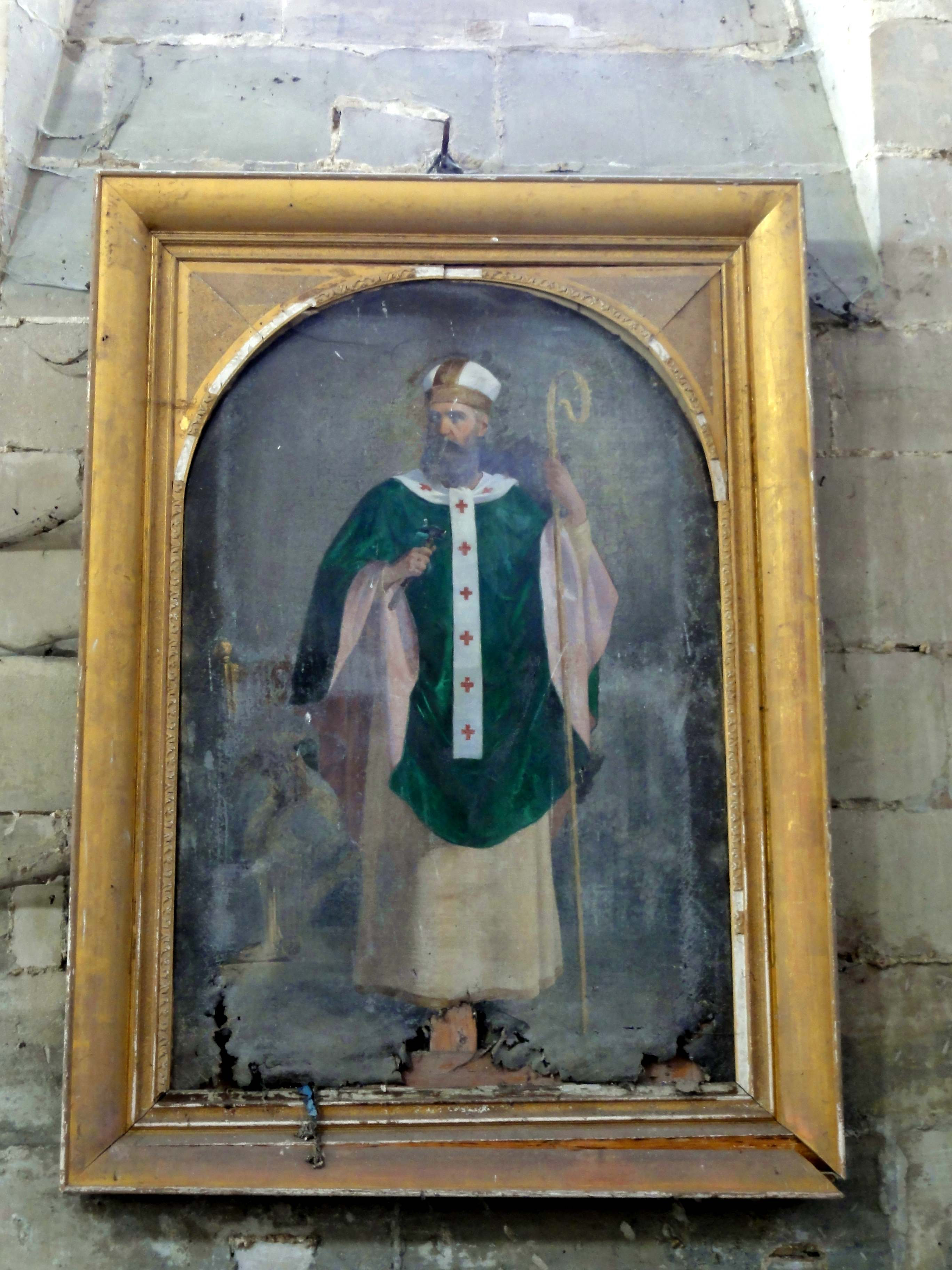 Mobilier de l'église (voir titre).